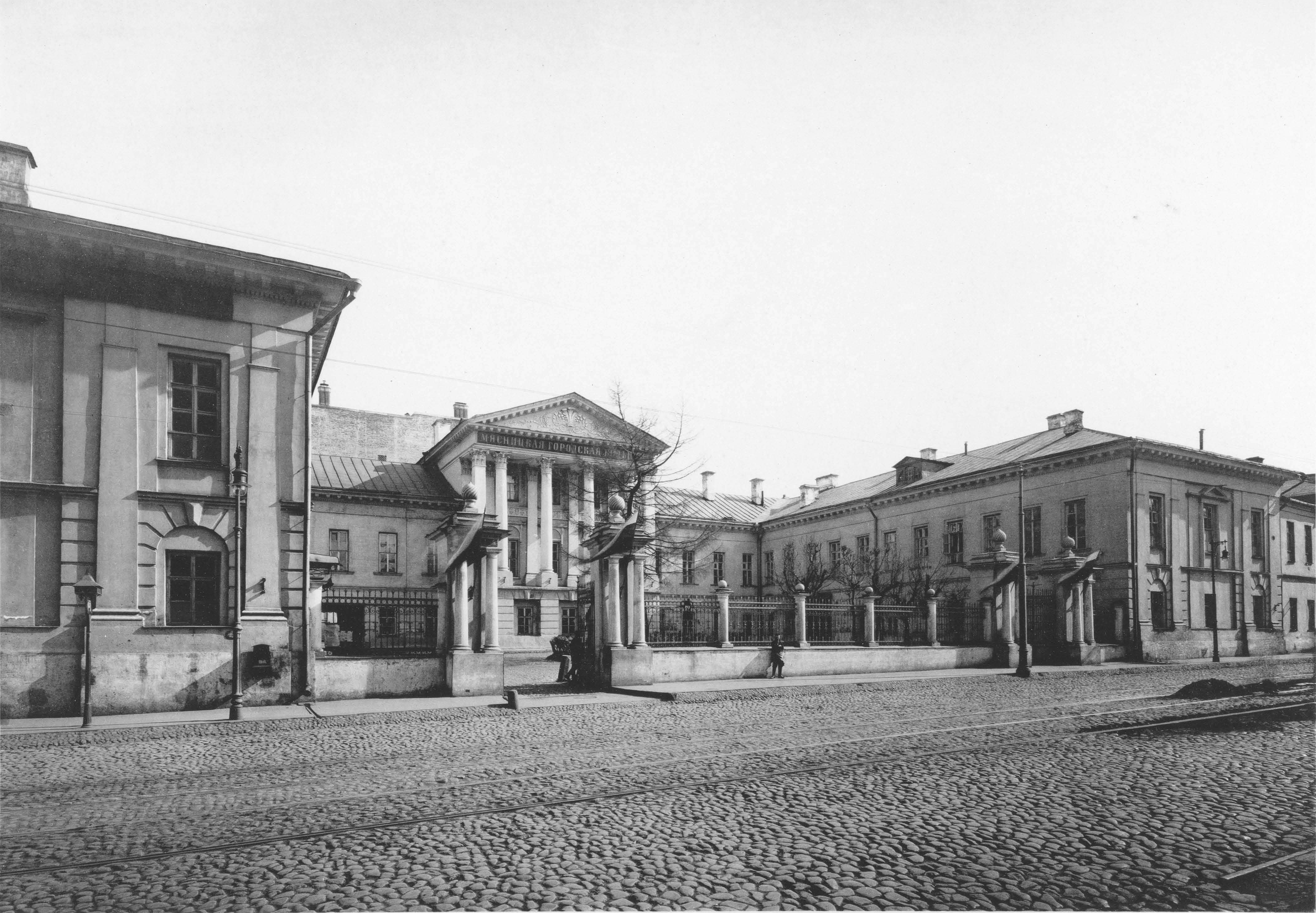 61. Мясницкая городская больница. (Москва)